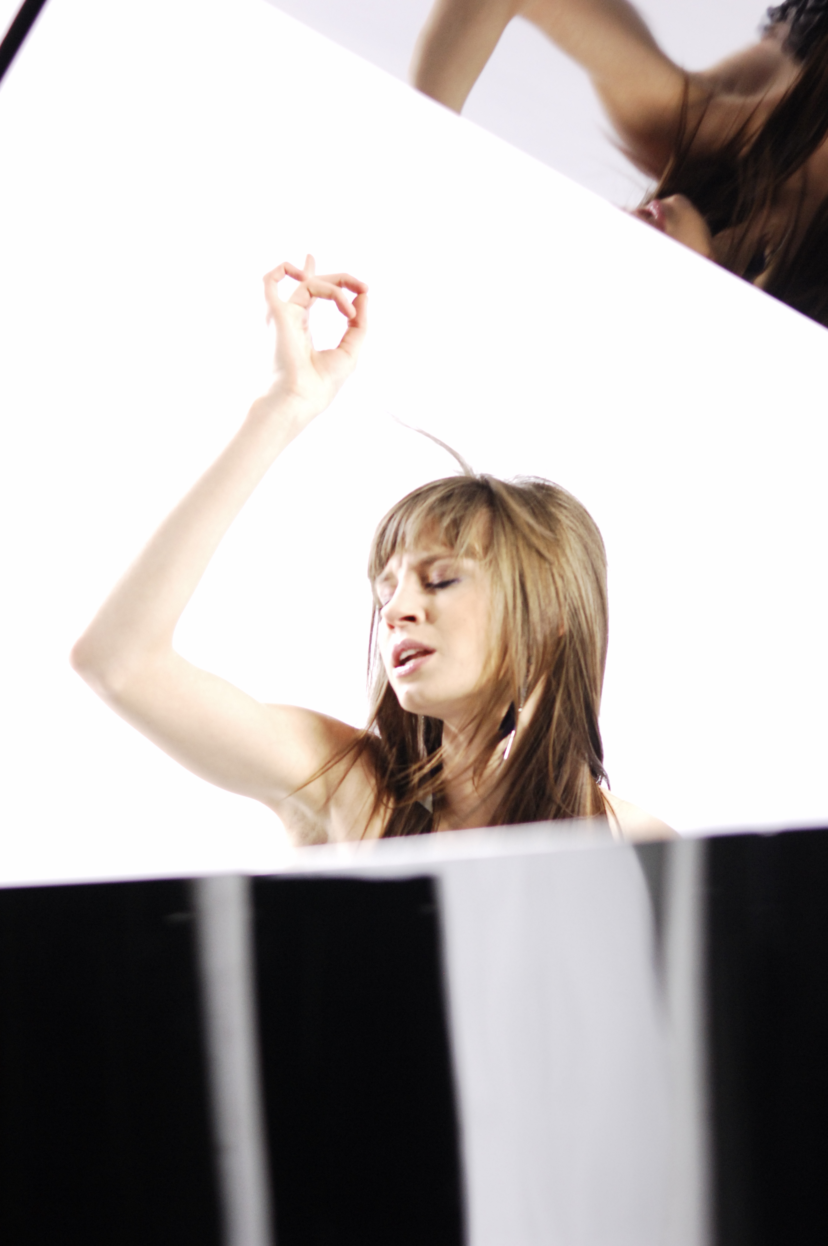 Sylwia Grzeszczak - polska wokalistka.